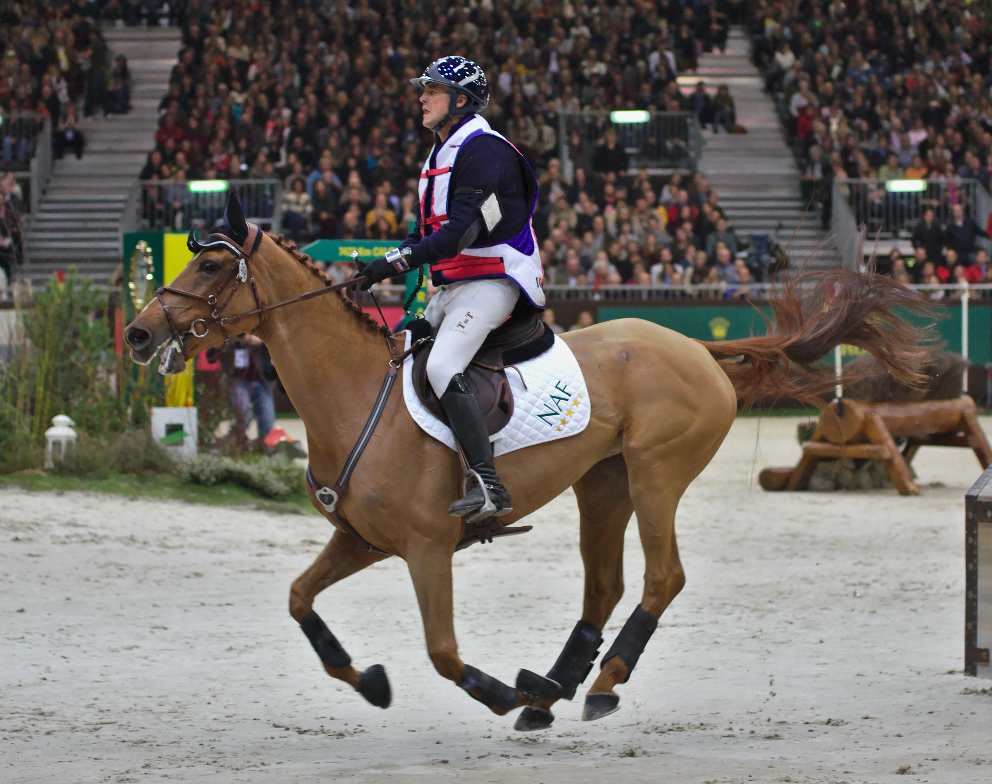 54eme CHI de Genève - 20141213 - Indoor Cross Country - Karim Florent Laghouag et Pégase du Tuc